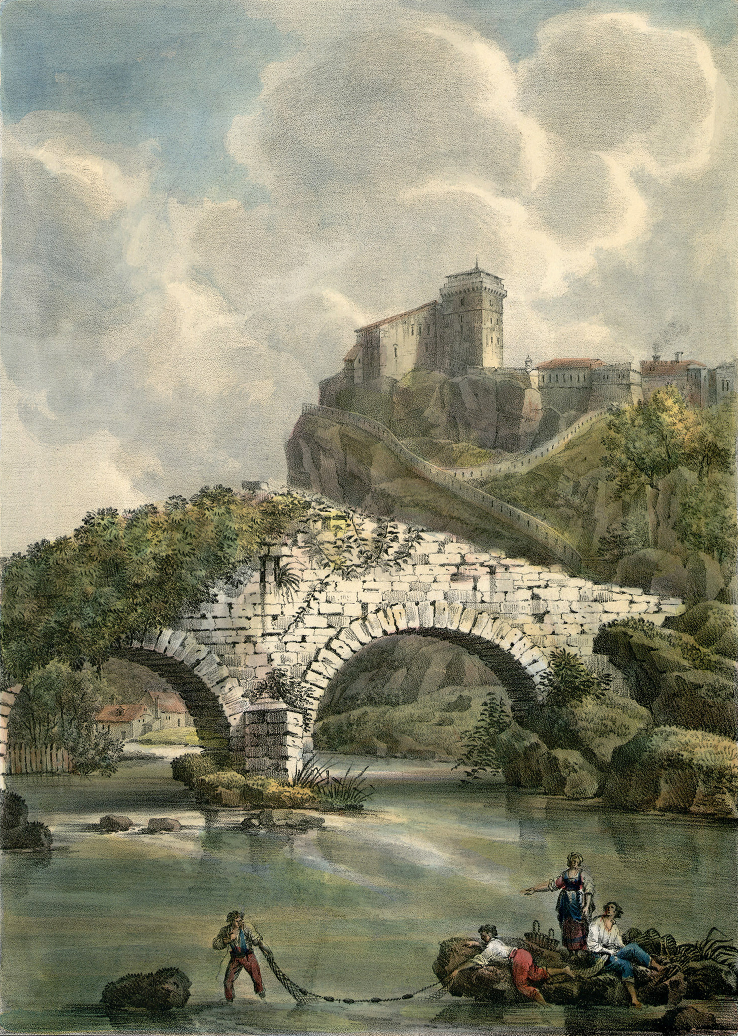 Vue du Pont Vieux et du Château de Lourdes en 1821.